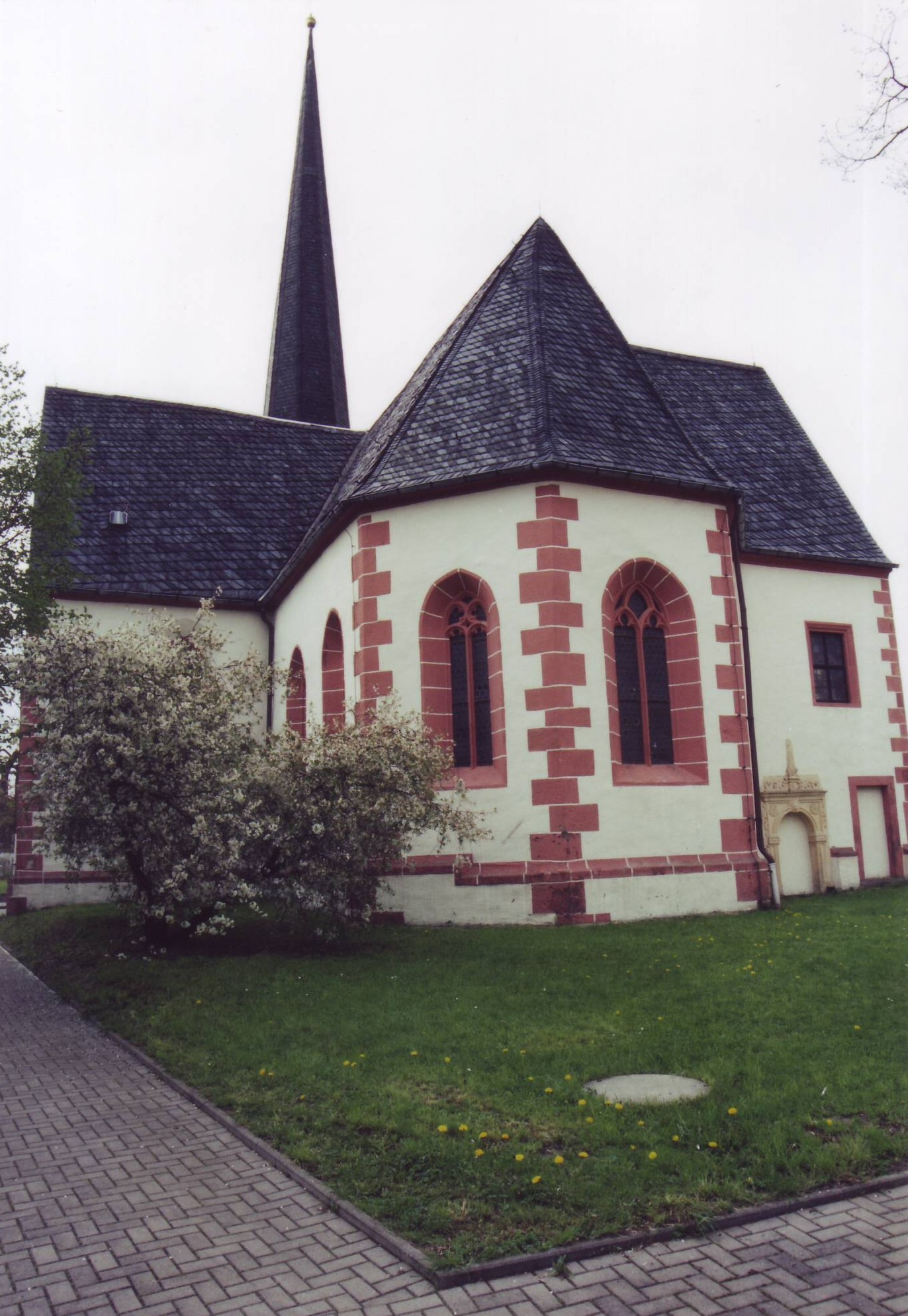 Evangelische St. Annenkirche zu Prießnitz (Gemeinde Eulatal/Sachsen)